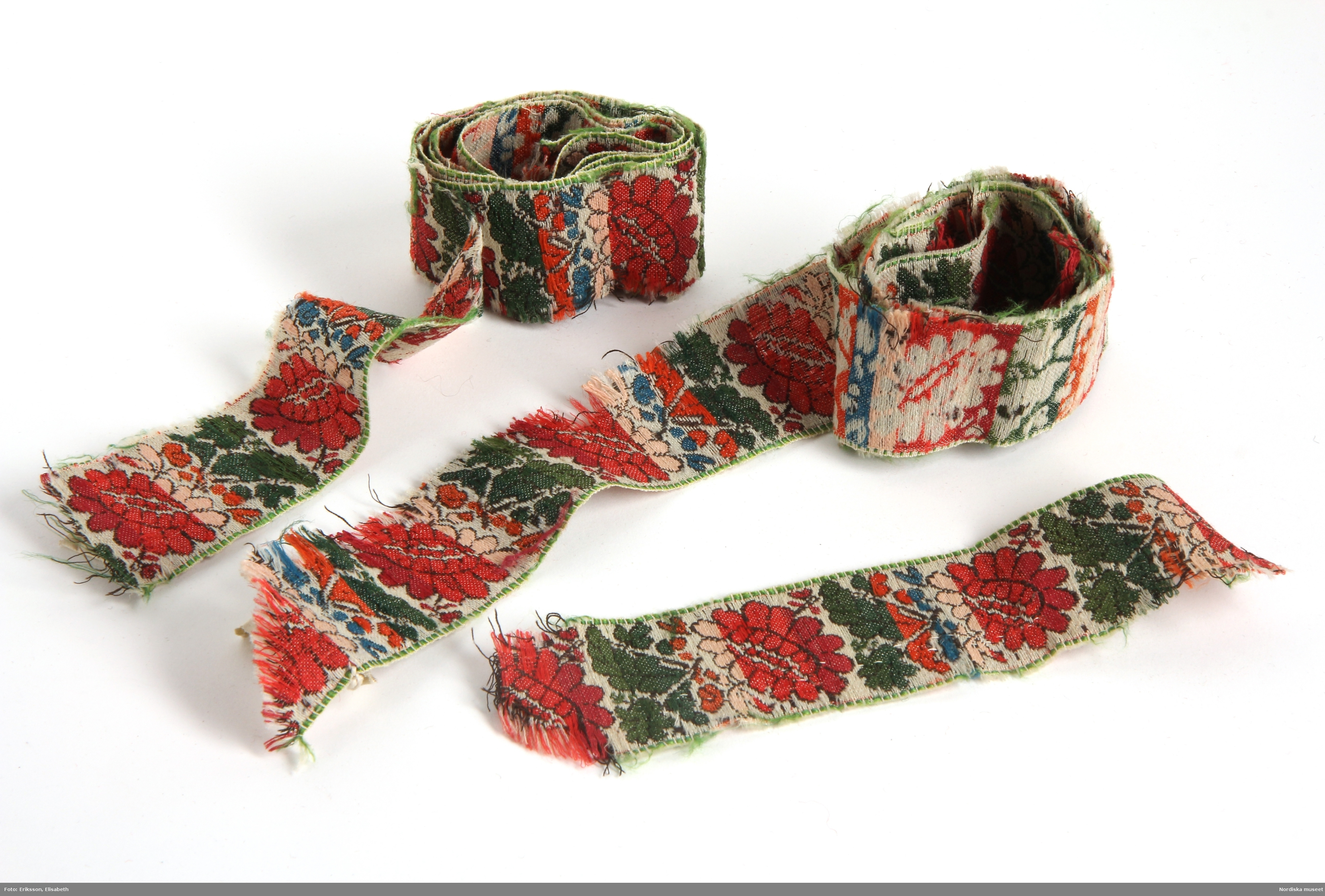 Huvudliggaren (år 1883): "35.726 Brudgumsdräkt fr. Toarps sn. Ås hd. Västergötland. a. Blå långrock, med broderi i silke. b. Röd toppmössa; till mössan hör en tofs i toppen. c. Väst, troligen begagnad som tröja. d. Blå knäbyxor. e. Strumpeband. Till banden höra runda tofsar. 'Dräkten är från början af detta århundrade.'; Se bref från Södermark 21/5 1883. a. Maläten. d. Maläten. e. Maläten. 'I dräkten saknas: strumpor, hvita eller blå, skor, helst med spännen, bomullshalsduk, skjorta.' Se bref från Södermark af den 22/5 1883. G. af handlanden Oscar Vennberg i Borås genom lant [?]kamrer I.A. Södermark i Borås 23/5 1883. Bil. Södermark."